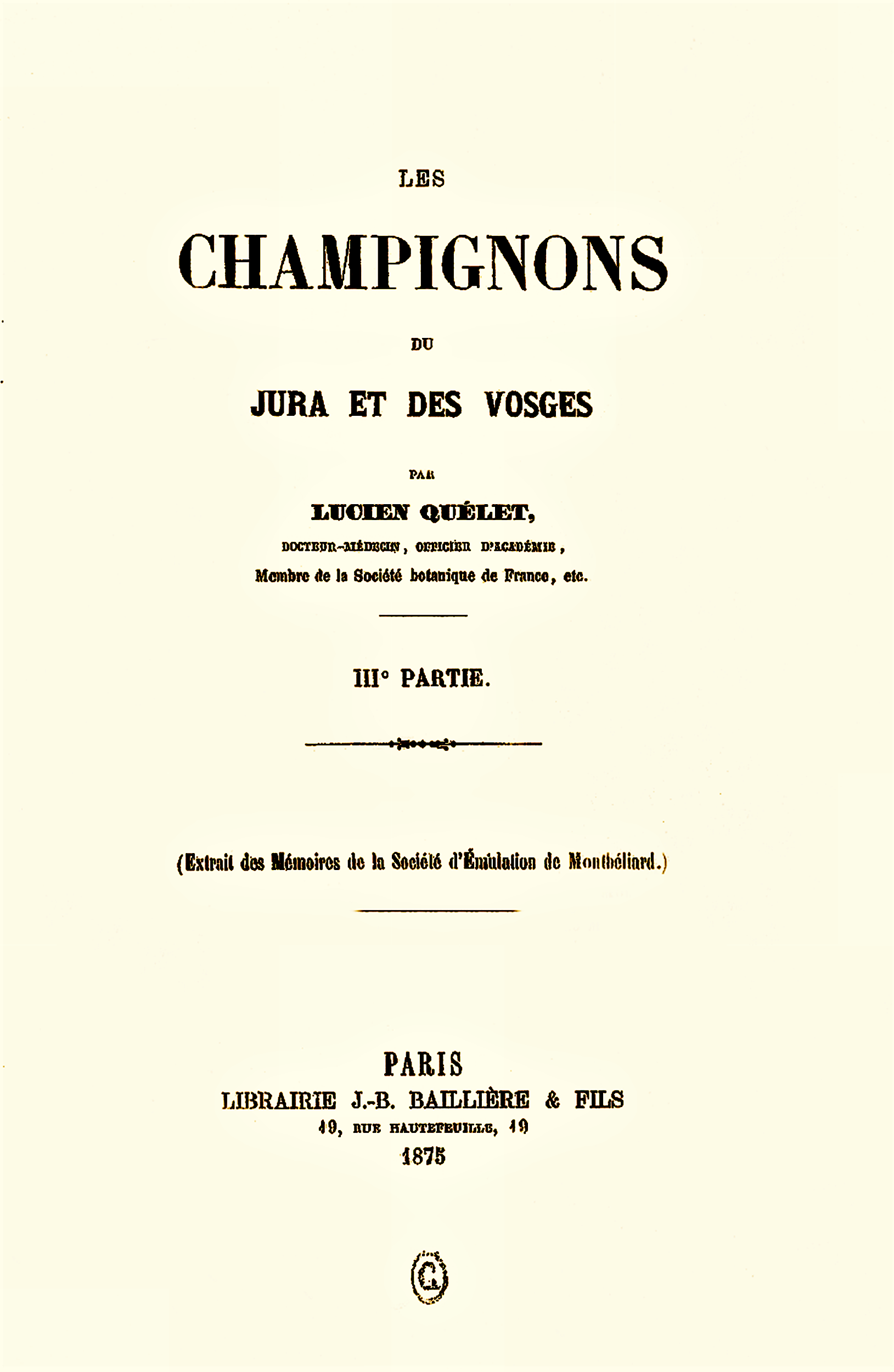 Lucien Quélet : Les champignons du Jura et des Vosges, vol. III, în: Mémoires de la Société d’Émulation de Montbéliard, Editura Imprimerie et Lithographie de Henri Barbier, Montbéliard 1875